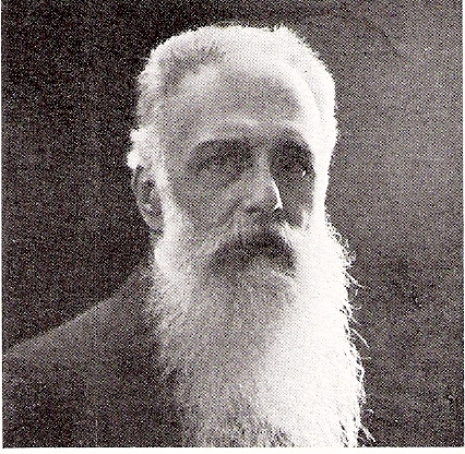 Fotografia del geologo e paleontologo Arturo Issel (1842-1922)